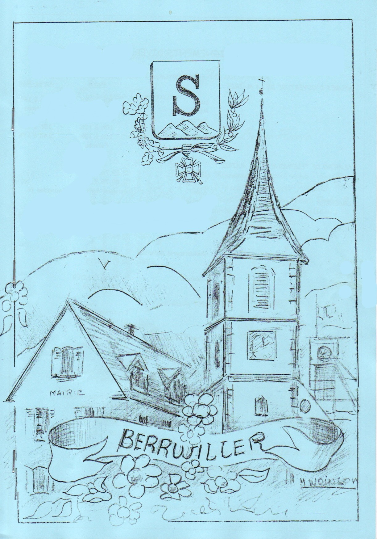 Dessin des symboles du village